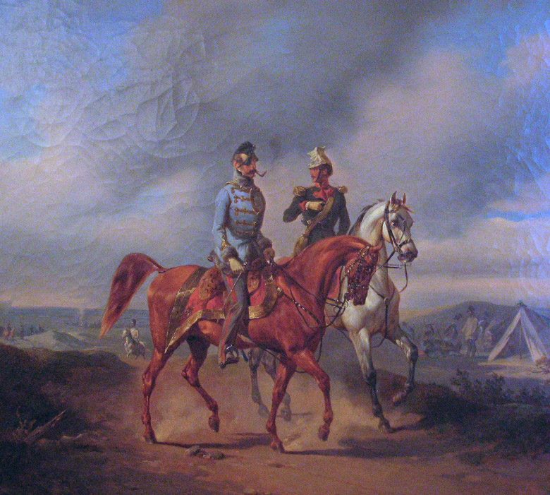 Porträt Franz Joseph Heinrich von Schlik, Graf zu Bassano und Weißkirchen (1789-1862)